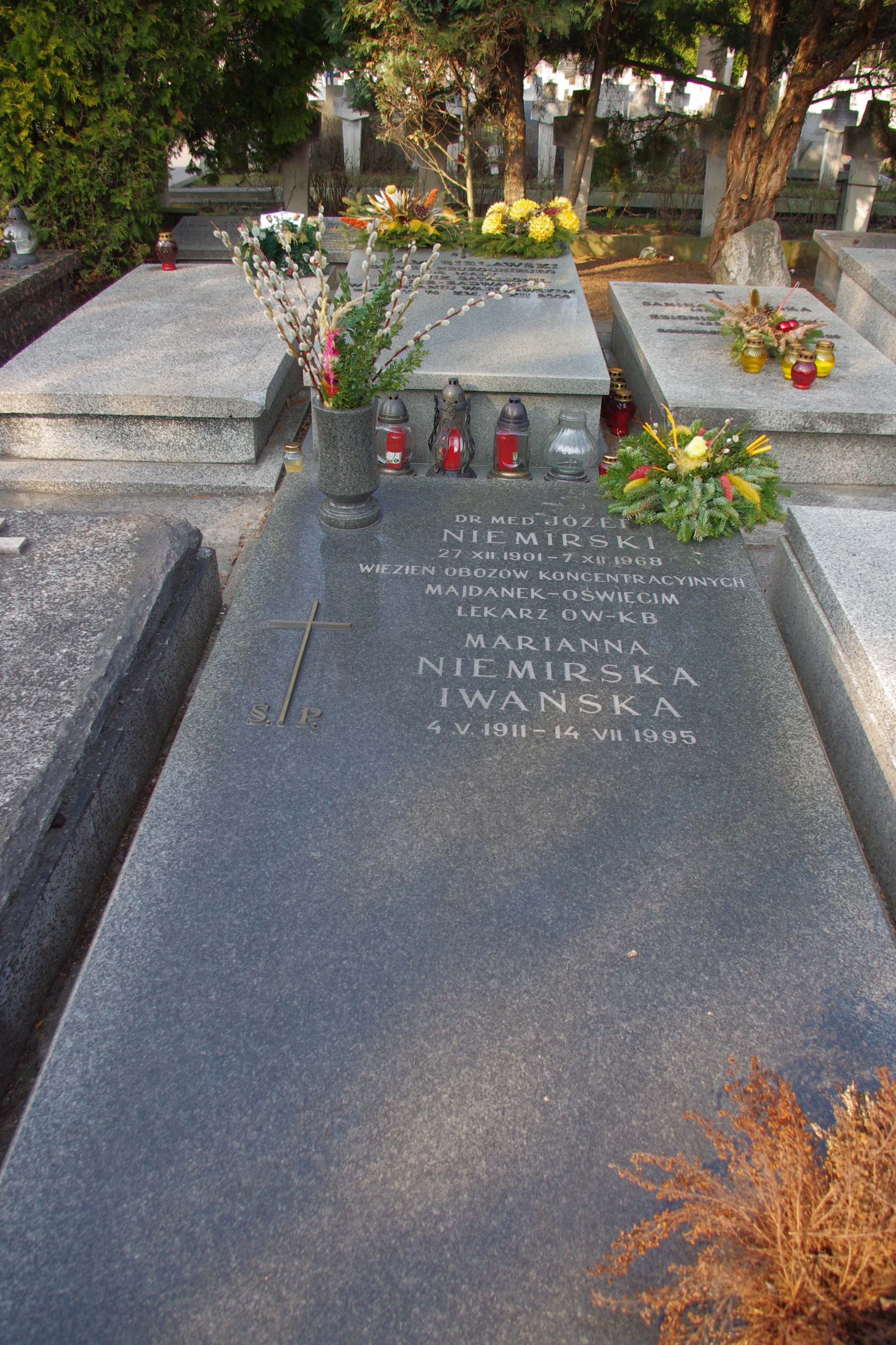 Grób dr med. Józefa Celmajstera (Józef Niemirski) - lekarza ŻZW, w powstaniu w getcie na Cmentarzu Wojskowym na Powązkach w Warszawie